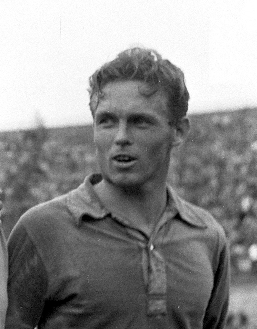 Fifa Elftal, Gerhard Hanappi. Betreft demonstratiewedstrijd van Fifa-elftal tegen CF Barcelona in Olympisch stadion